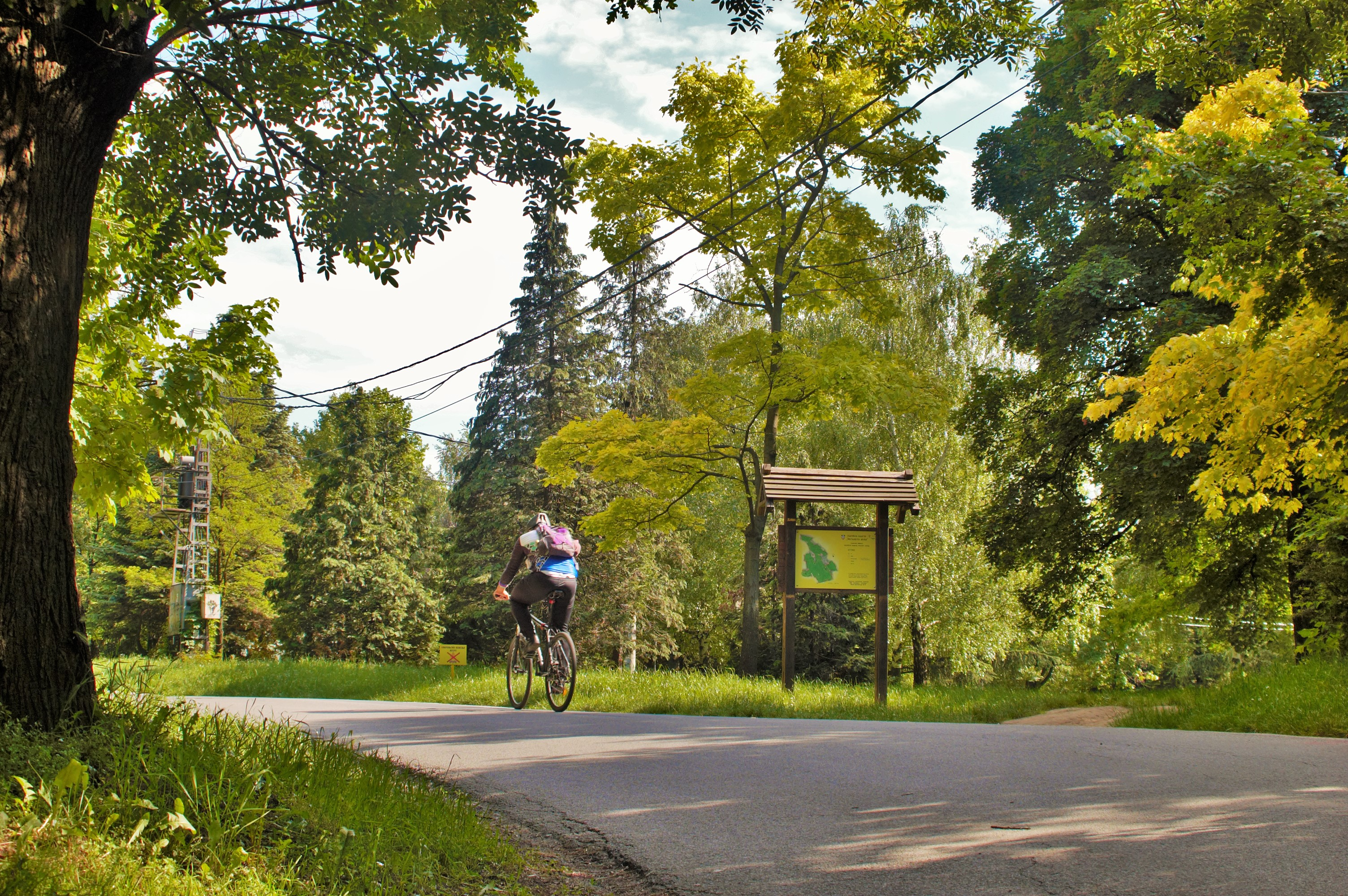 Srpski (latinica): Ово је фотографија заштићеног природног добра у Србији под шифром: СП014 This is a a photo of a natural area in Serbia with ID: СП014 Споменик природе Звездарска шума